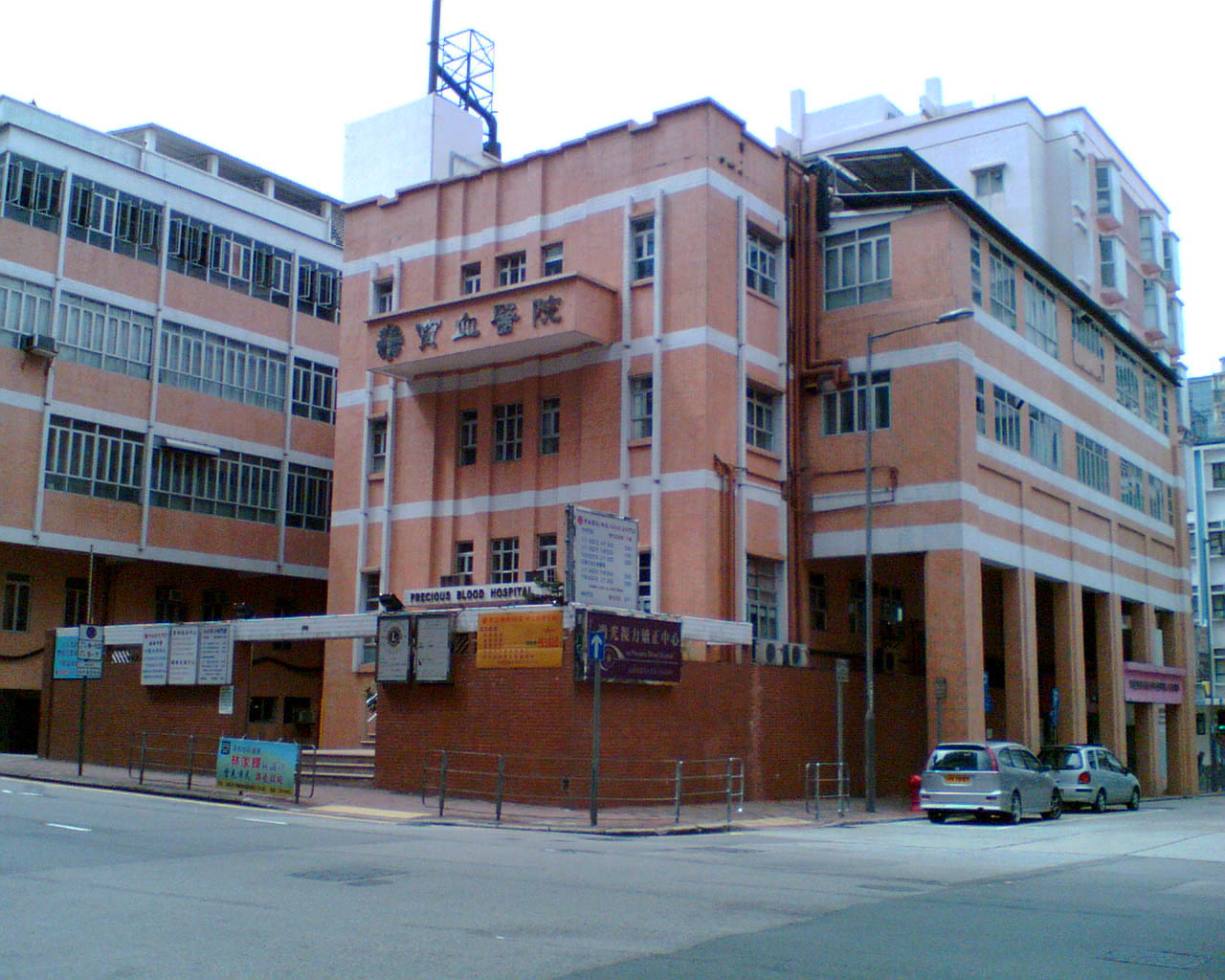 寶血醫院 (明愛)